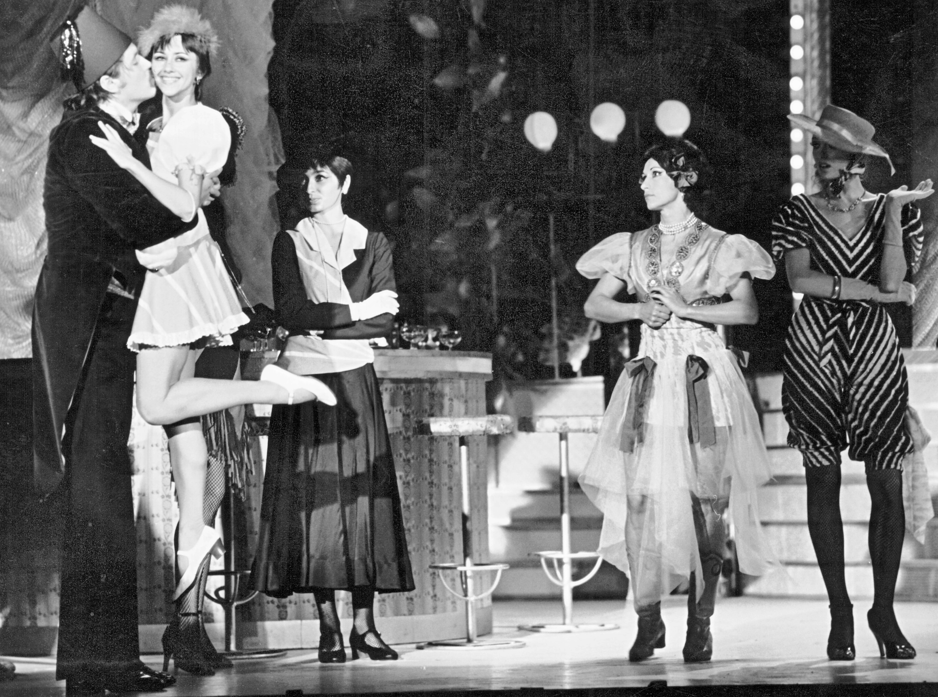 Ábrahám Pál: Bál a Savoyban - jelenet